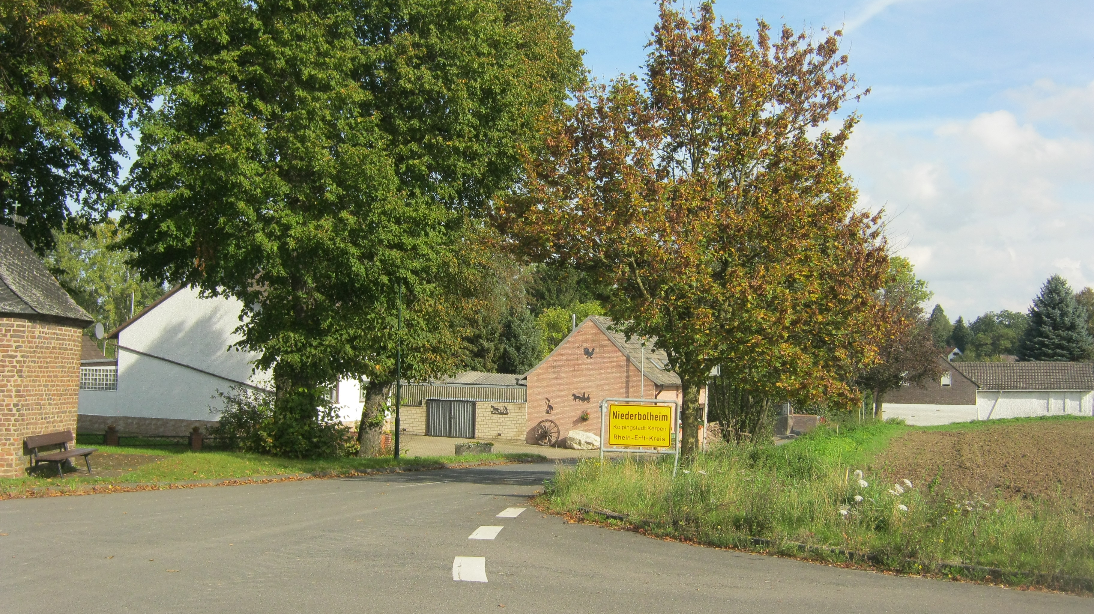 Ortseingang